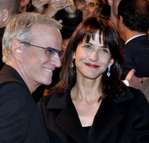 Sophie Marceau et Christophe Lambert à l'avant-première parisienne de "Skyfall"